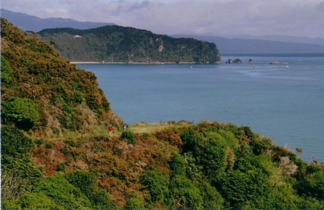 Abel Tasman NP